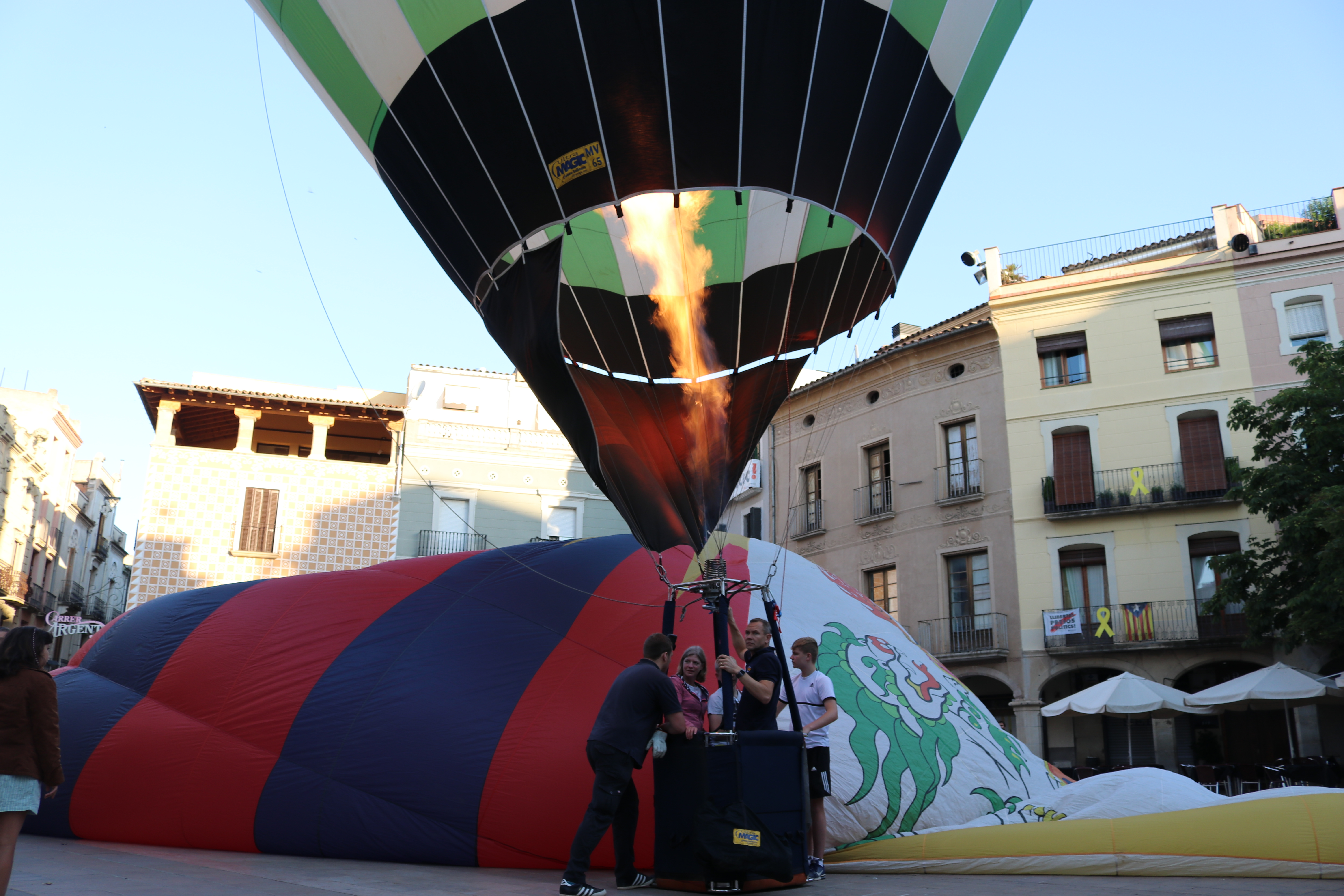 Vol de ciutat, European Balloon Festival 2019